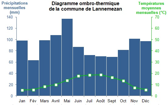 Diagramme ombrothermique de Lannemezan